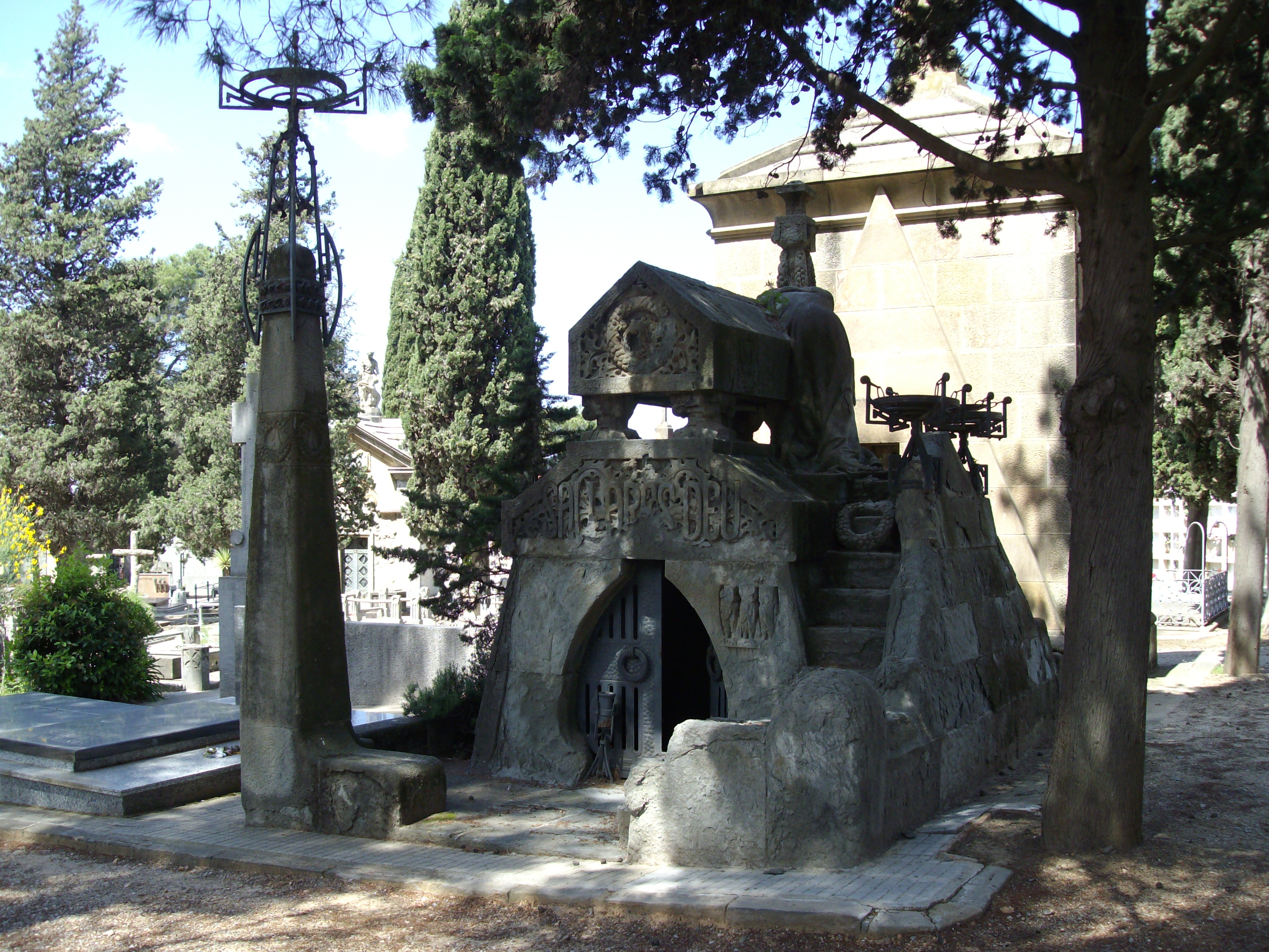 Mausoleo de la familia Sallarés Deu, construido en 1916 por el arquitecto Eduard M. Balcells Buïgas y el escultor Franz Metzner.